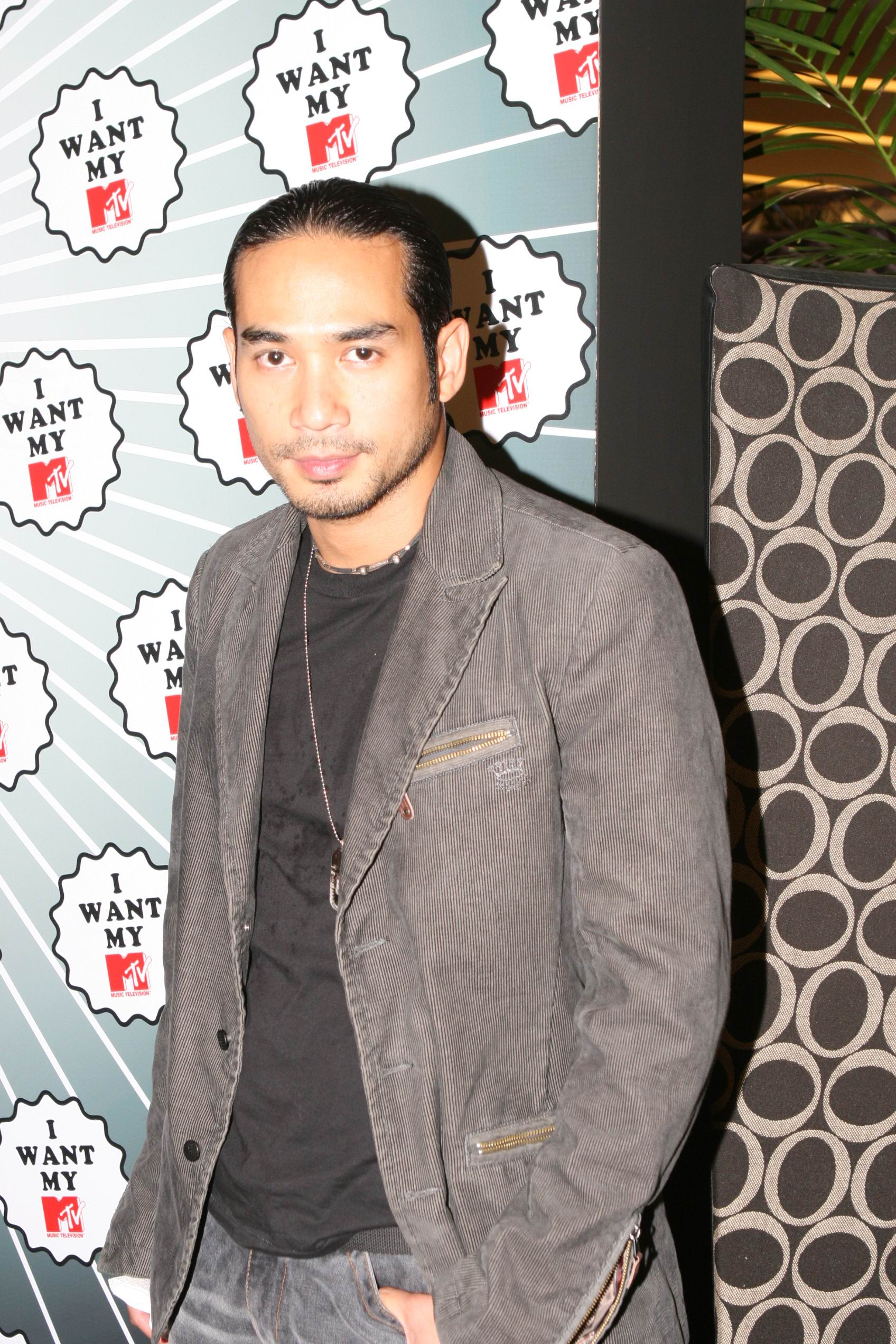 Teerapat Sujjagul (ธีรภัทร์ สัจจกุล) -Thai Actor,Singer